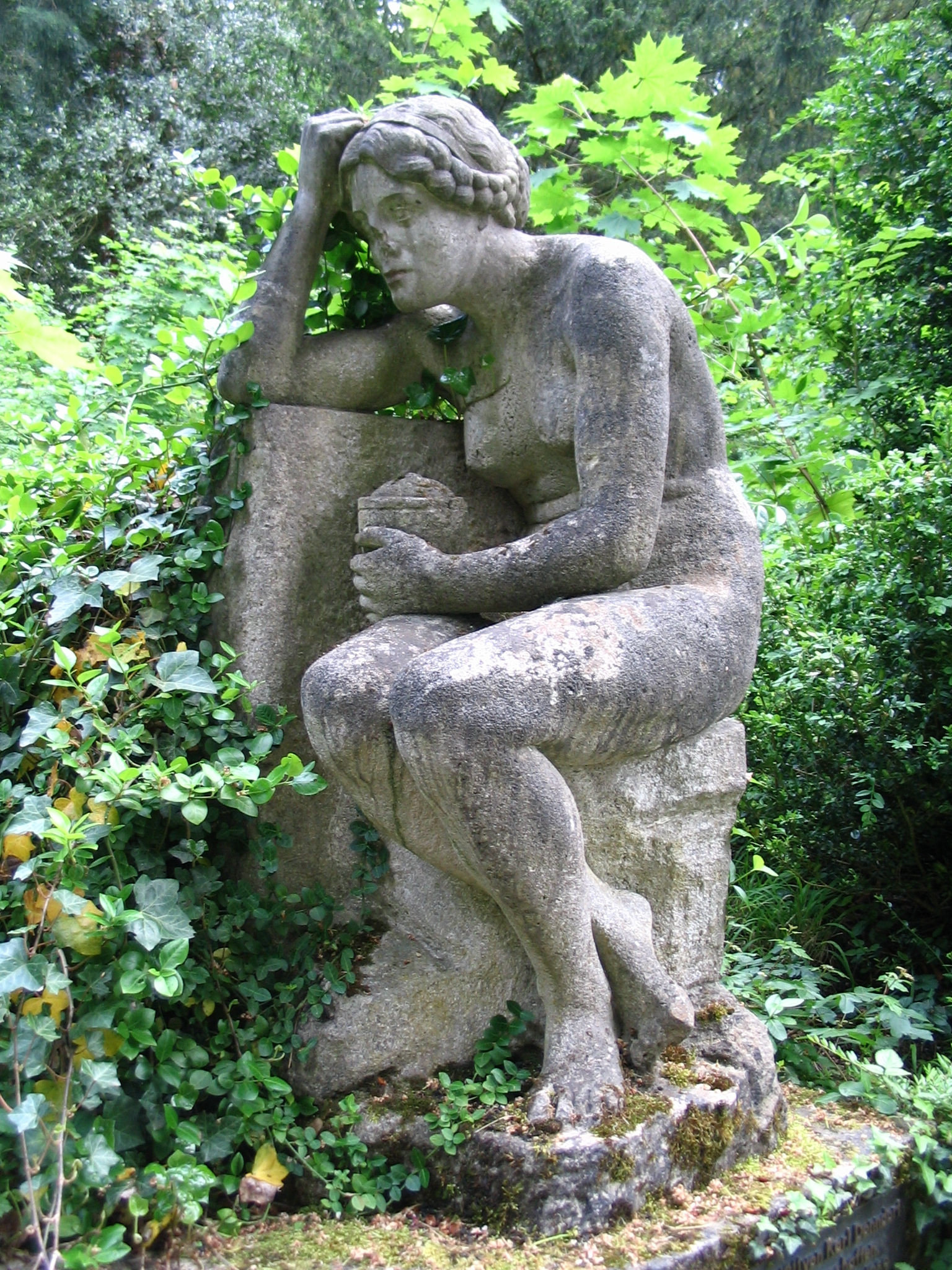 Die Figur der Pandora am Athenebrunnen an der Karlshöhe in Stuttgart.